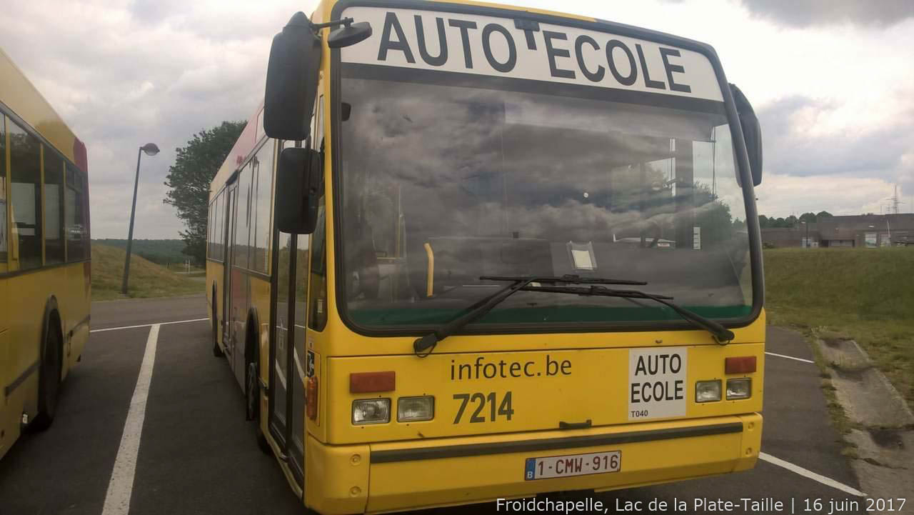 TEC Charleroi 7214 - Auto-école Froidchapelle, Lac de la Plate-Taille - 16 juin 2017 Van Hool A330 MAN ex-TEC Namur-Luxembourg 4.314 (04/2002)